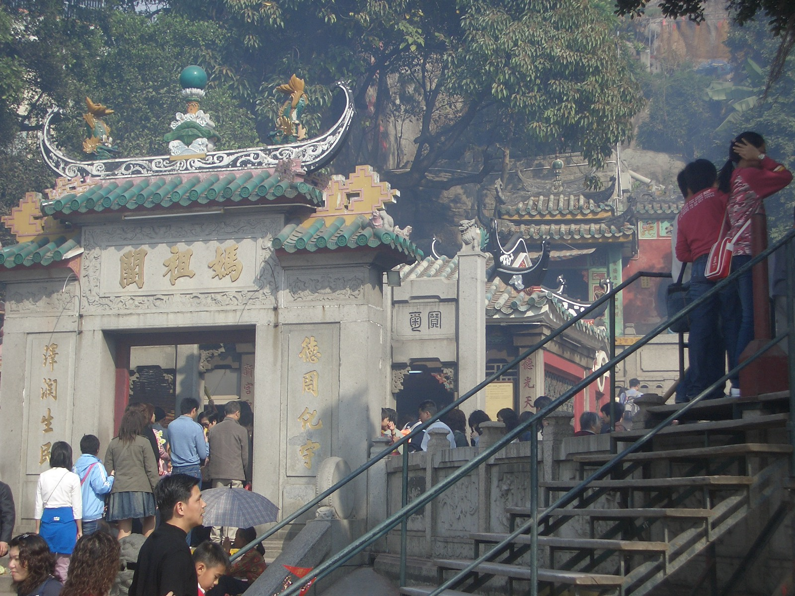 photo take by 9old9